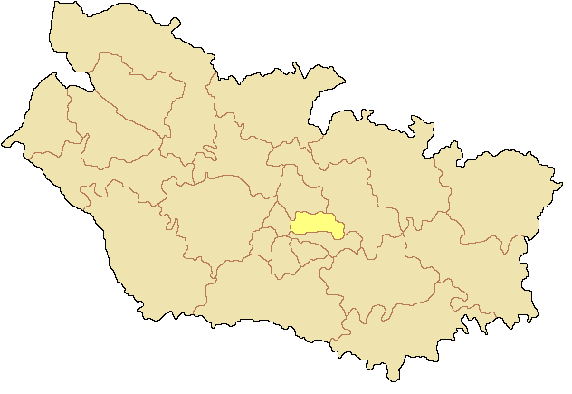 Canton d'Amiens-3 dans le département de la Somme